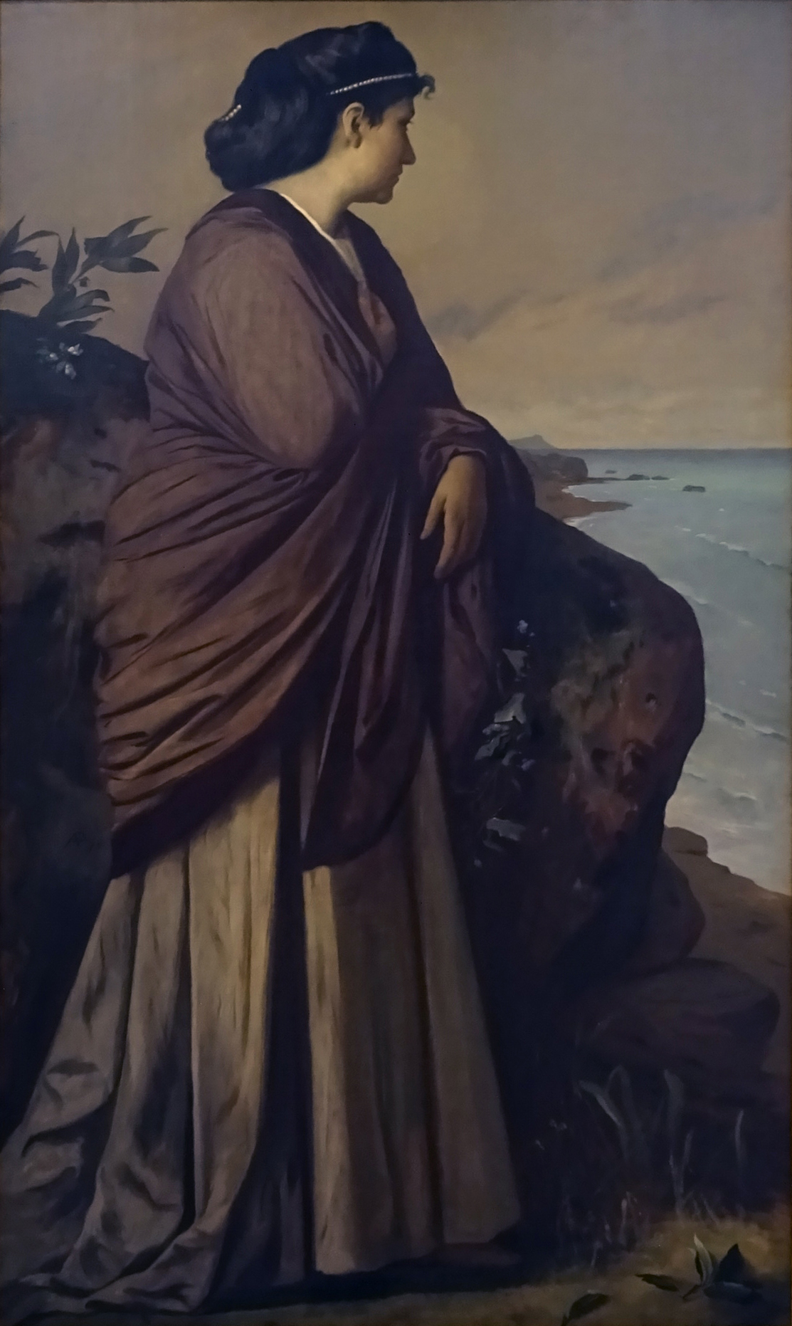 Anselm Feuerbach, Am Meer (Moderne Iphigenie, dritte Fassungen), 1875, Öl auf Leinwand, Inv.-Nr. M 4126